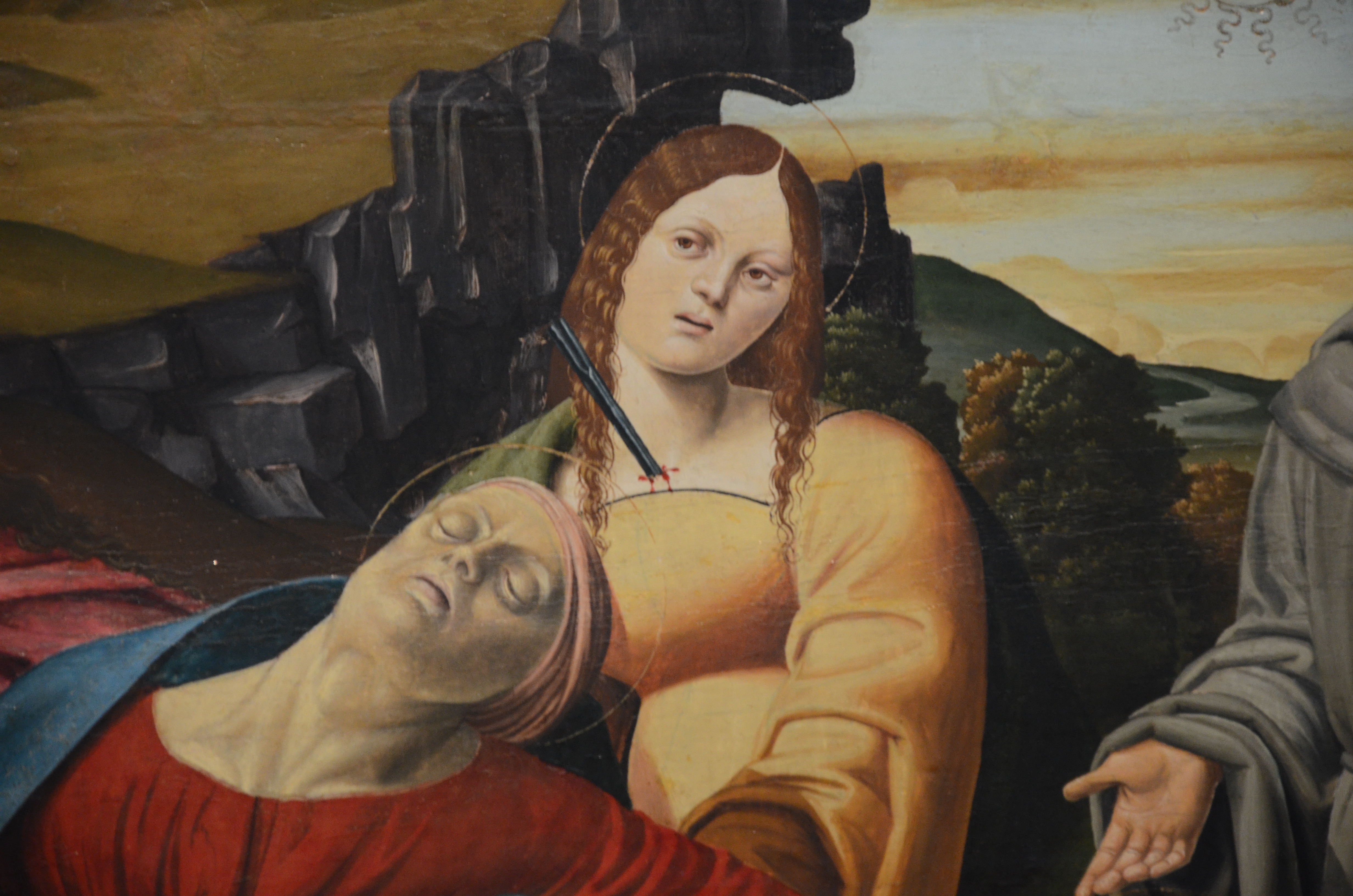 detail